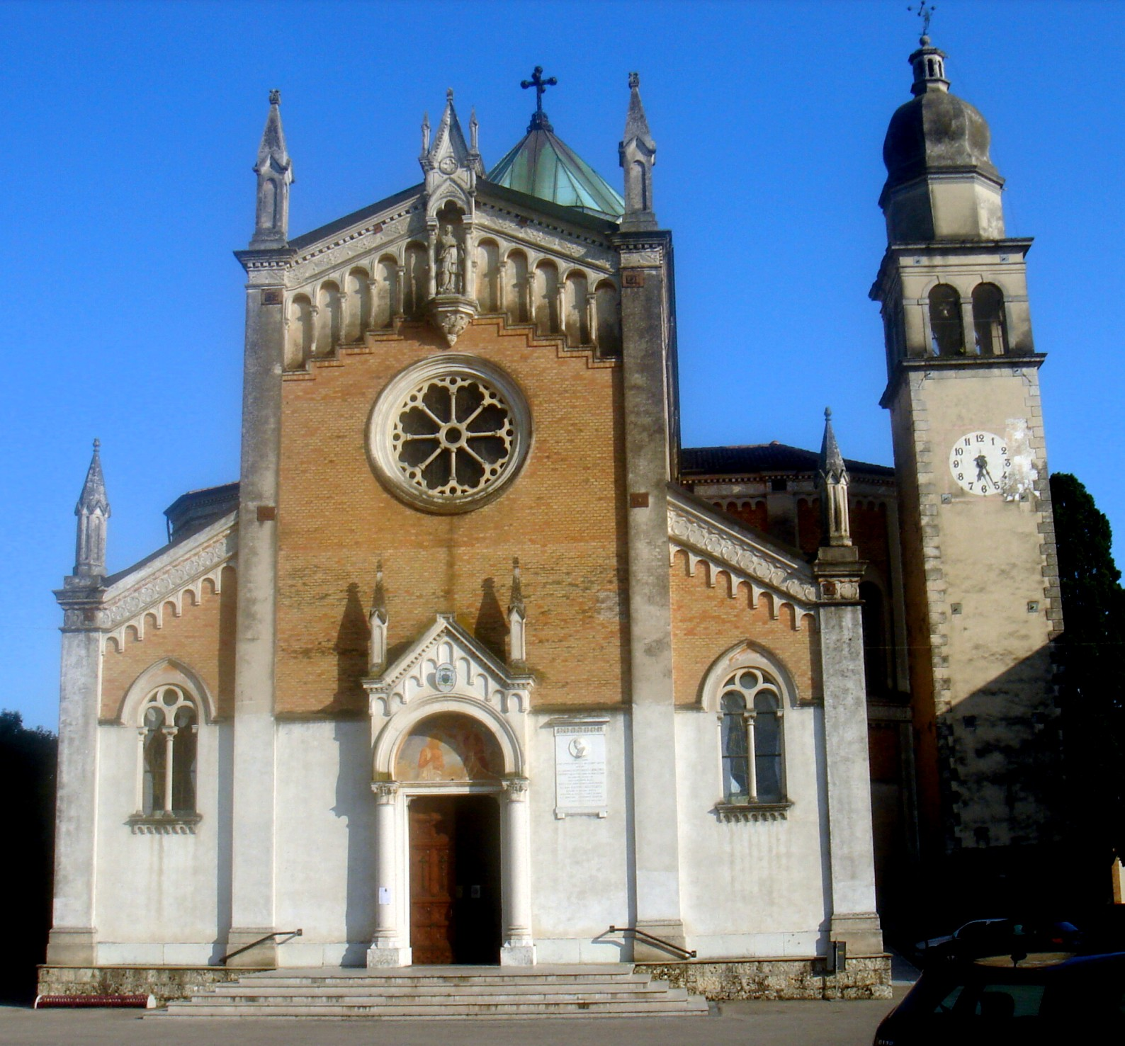 San Fior, chiesa arcipretale di San Giovanni Battista